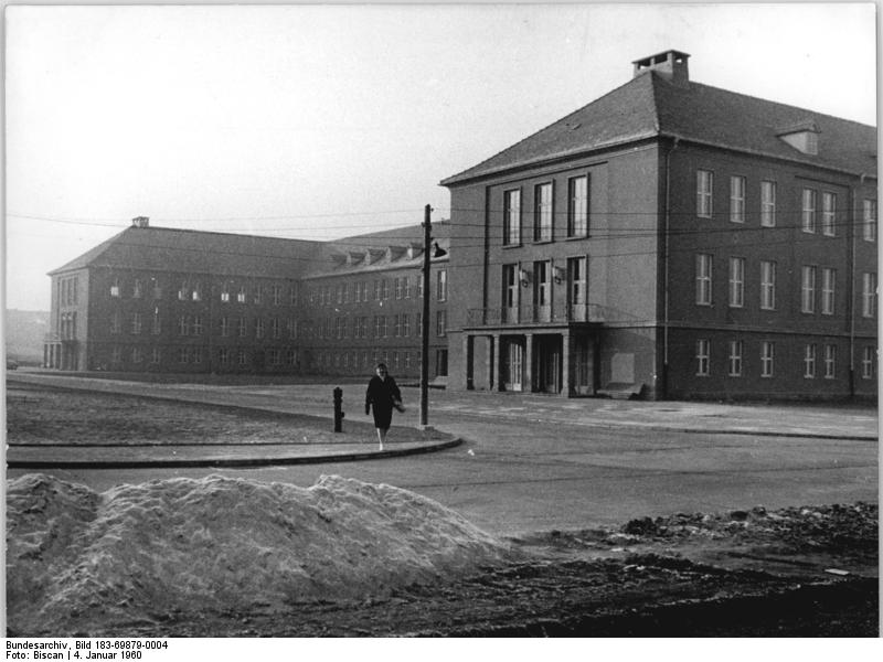 Magdeburg, Pathologisches Institut Zentralbild Biscan 4.1.1960 Eine neue Forschungs- und Lehrstätte in Magdeburg an der Medizinischen Akademie Magdeburg wurde das neuerbaute pathologische Institut in Benutzung genommen, für dessen Errichtung die Regierung der DDR 5 Millionen DM zur Verfügung gestellt hat. Das Institung enthält Hörsäle und Arbeitsräume für mehr als 200 Studenten; es ist mit den modernsten Geräten ausgestattet, für 2250 Obduktionen im Jahr berechnet und eine der größten und modernsten Ausbildungs- und Forschungsstätten. UBz: Der Neubau des pathologischen Instituts.